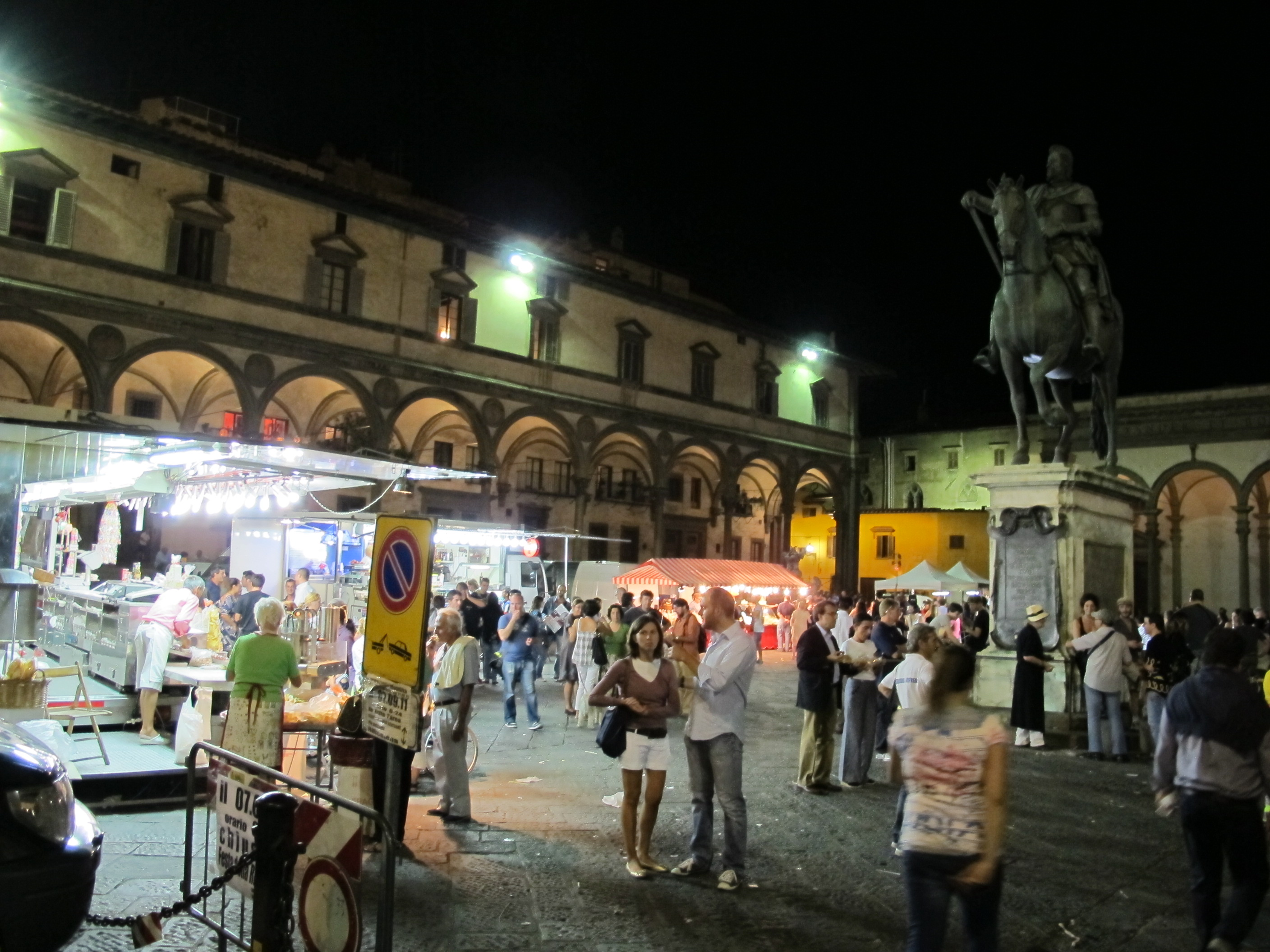 Festa della rificolona 2011, 01